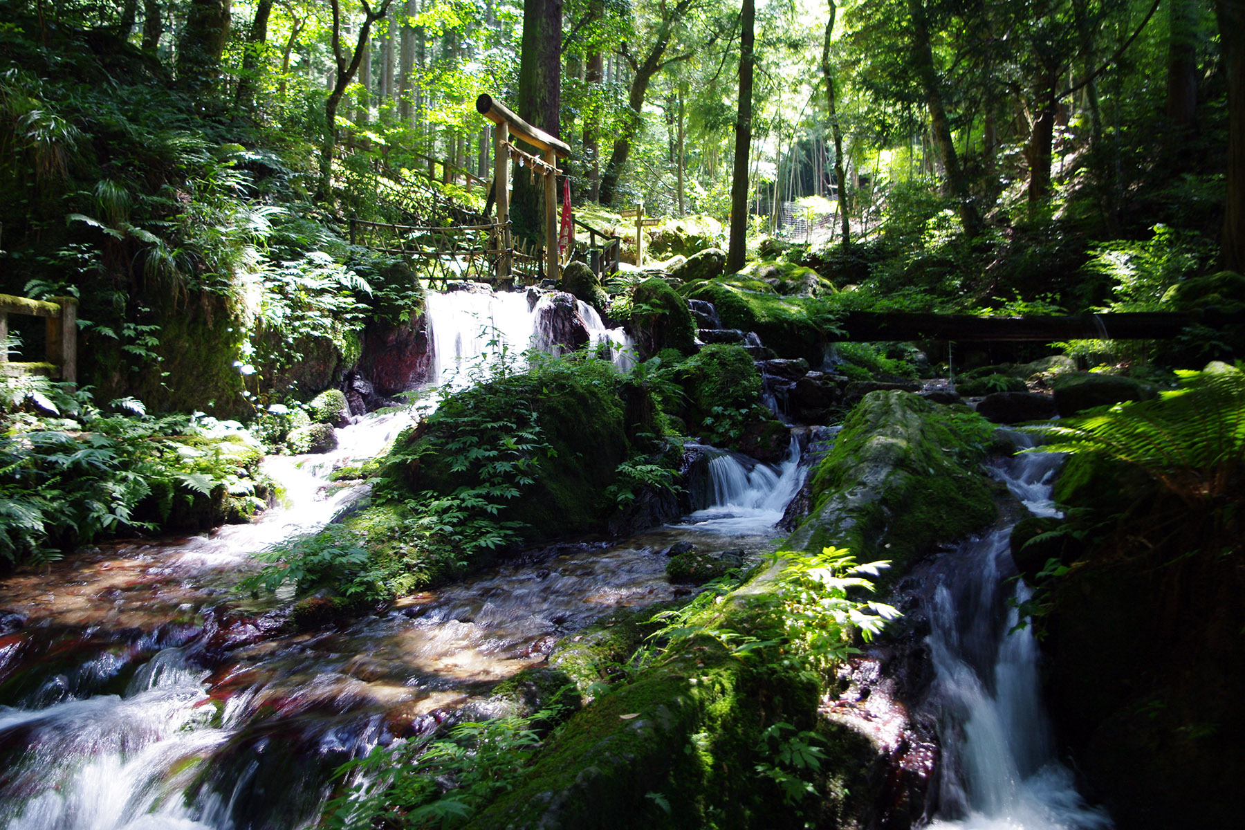 uriwarinotaki, falls in Wakasa, Fukui, Japan